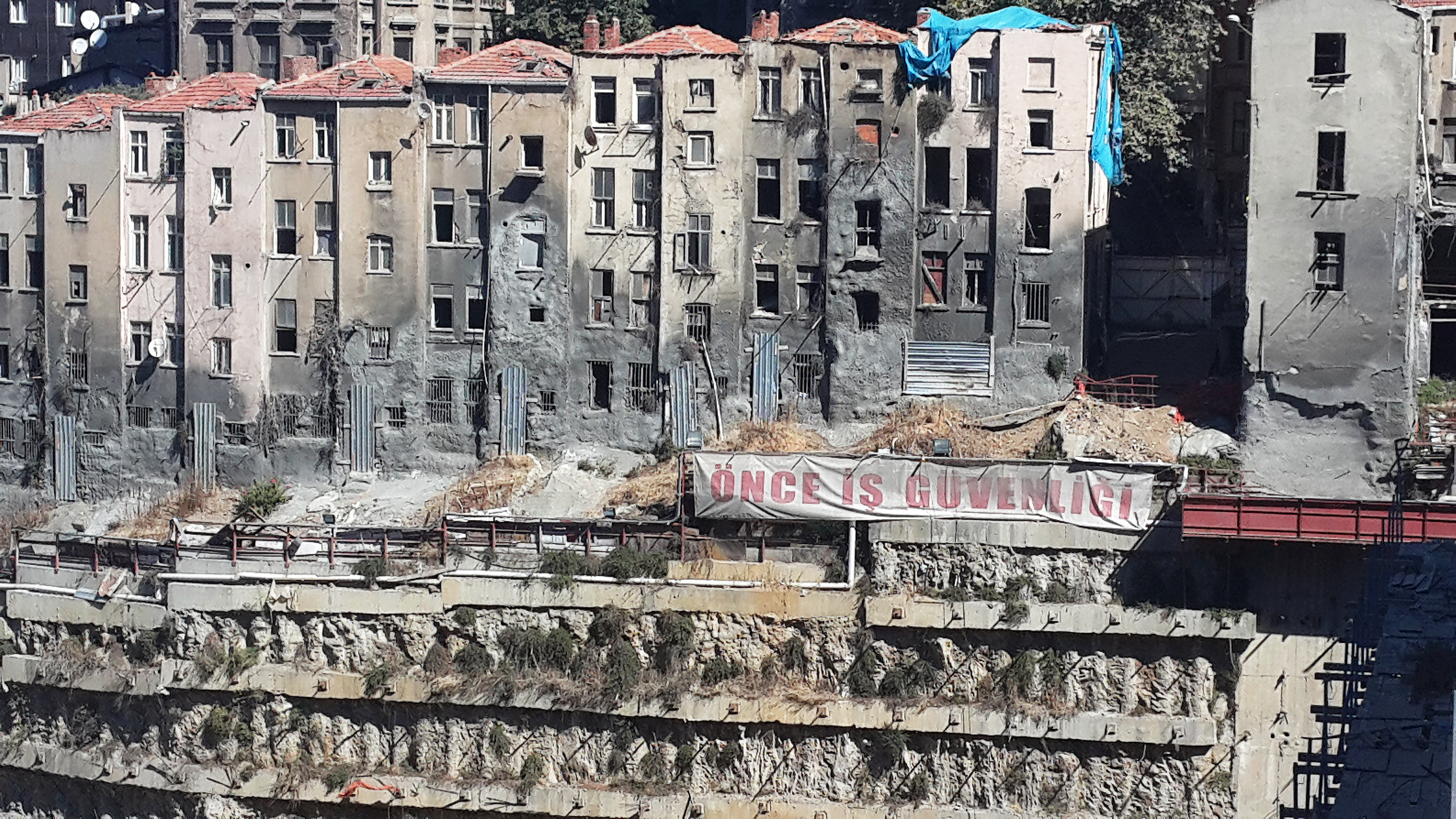 Şişli, İstanbul'da kentsel dönüşüm Urban Transformation in İstanbul, Turkey